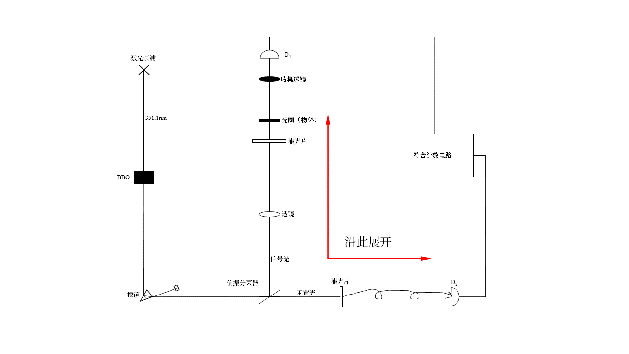 1995年，美国马里兰大学的史砚华小组实现了量子成像。这是他们使用的实验装置的示意图。